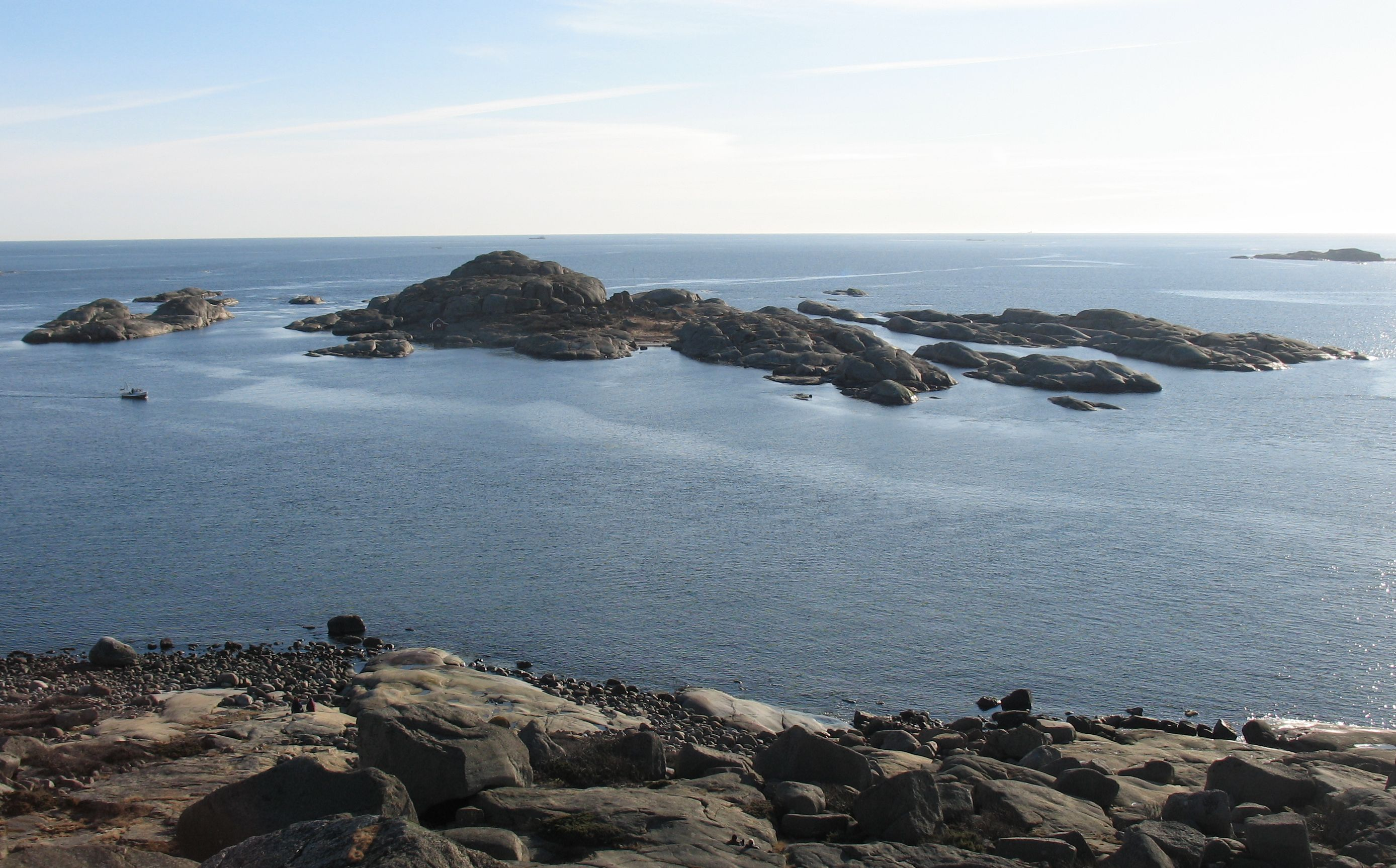 Uleholmen i Færder nasjonalpark sett fra Tjønneberget